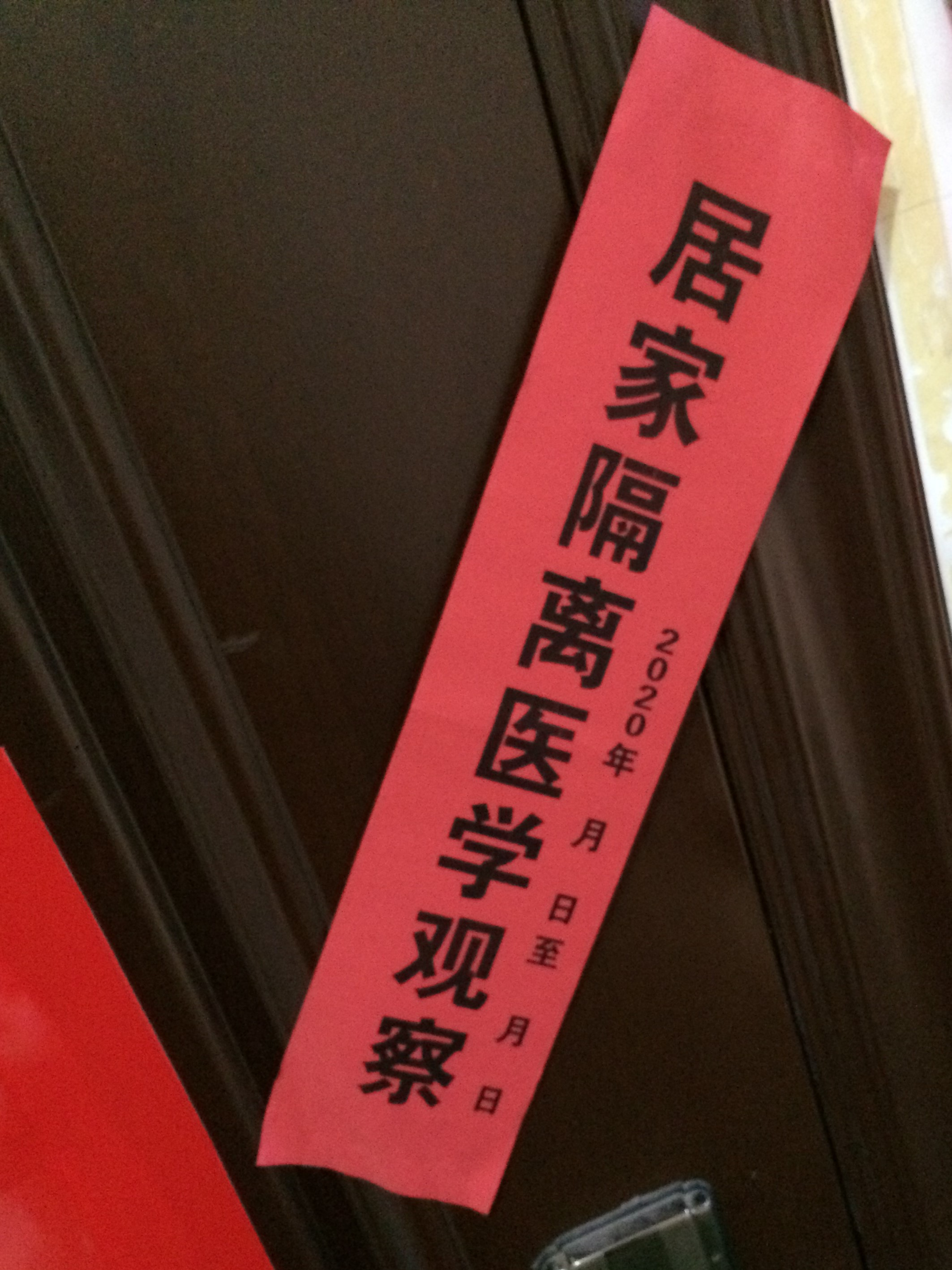 中文（中国大陆）: 浙江省玉环市玉城街道开具的一张封条